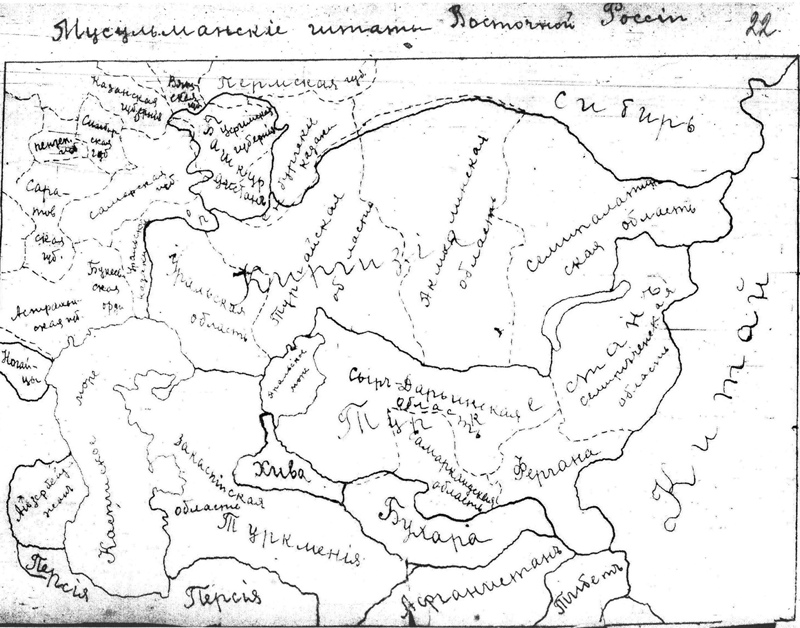 Карта Алашской автономии. Обнаружена в фонде Государственного архива РФ в Москве.